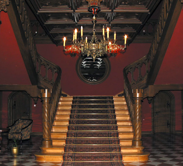 klatka schodowa w Pałacu w Starejwsi, fot. Goto (Tomasz Goździewicz) 26.05.2003 r.